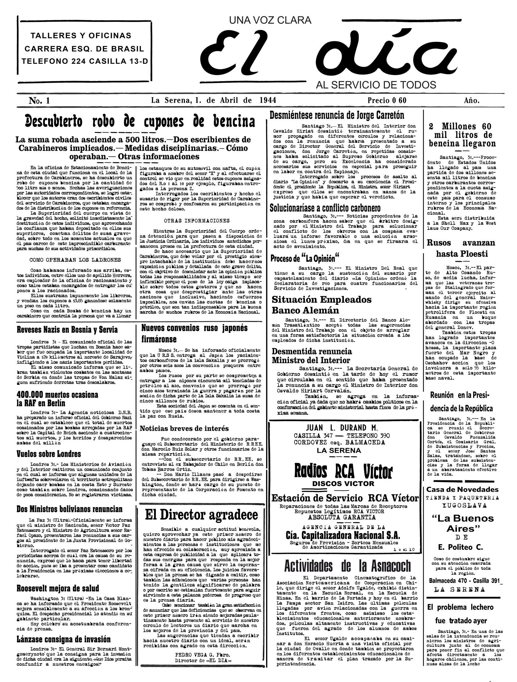 Portada de la primera edicion de El Dia, 1 de abril de 1944